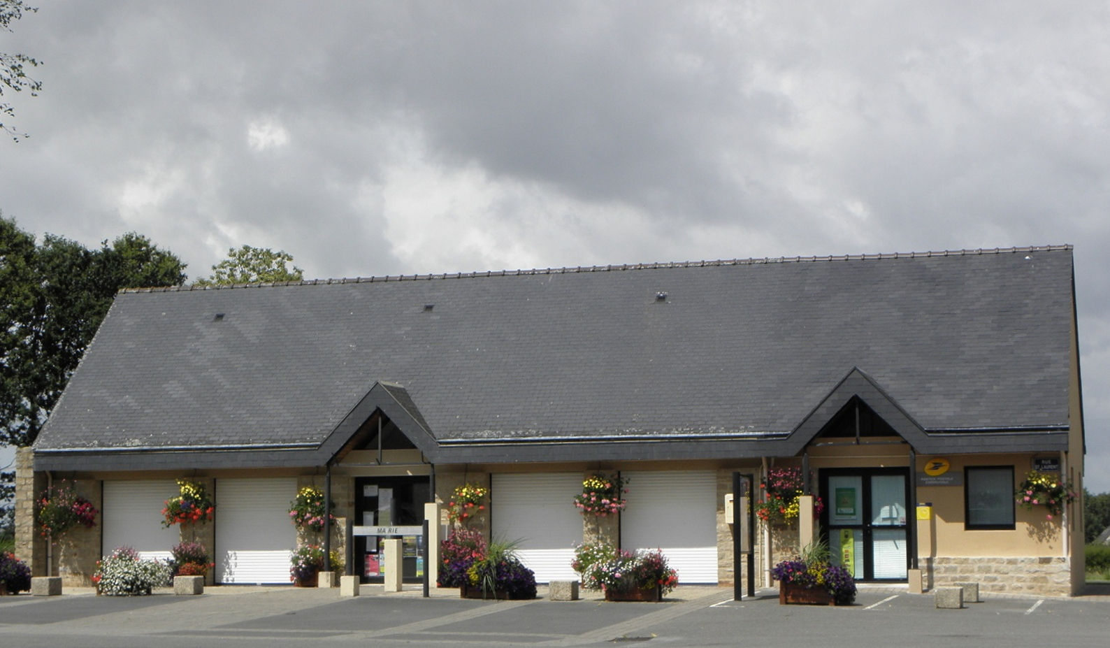 Mairie de Quéménéven (29).